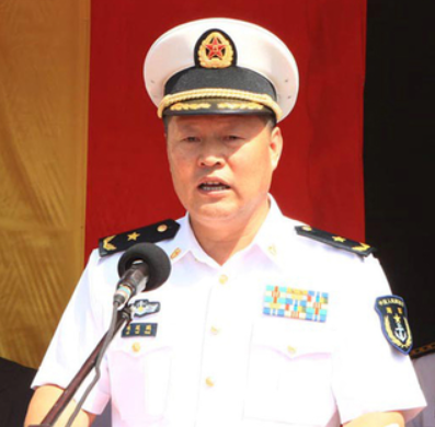 邱延鵬中国海軍参謀長